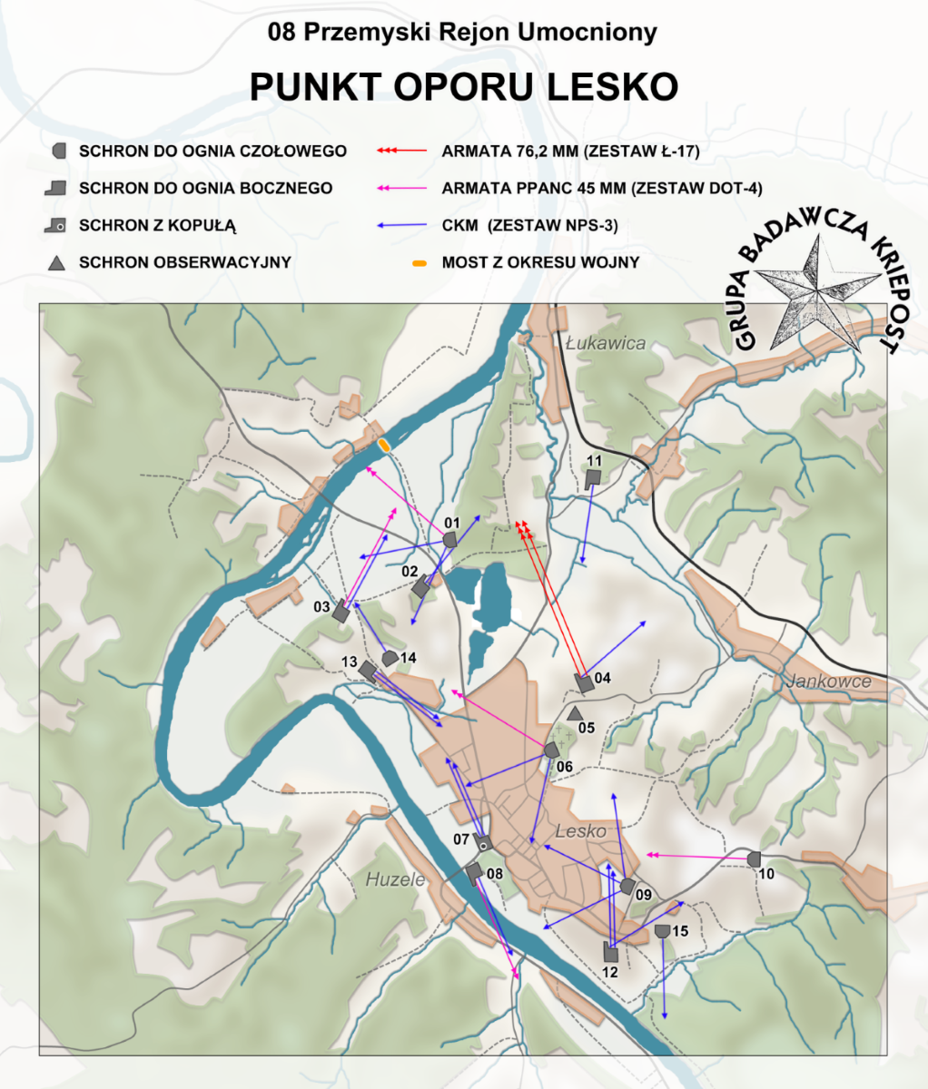 Linia Mołotowa - Punkt Oporu Lesko, 08 Przemyski Rejon Umocniony